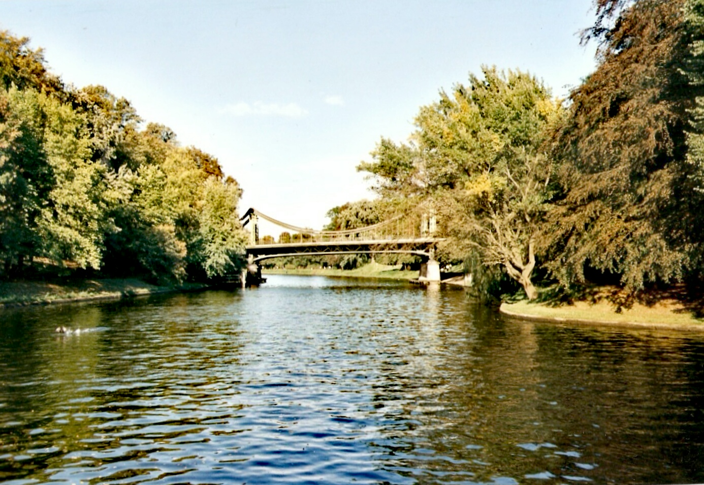 Mühlentorbrücke